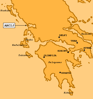 Ovu sam sliku nacrtao sam. --Zmaj 16:31, 1. lipanj 2007. (CEST)